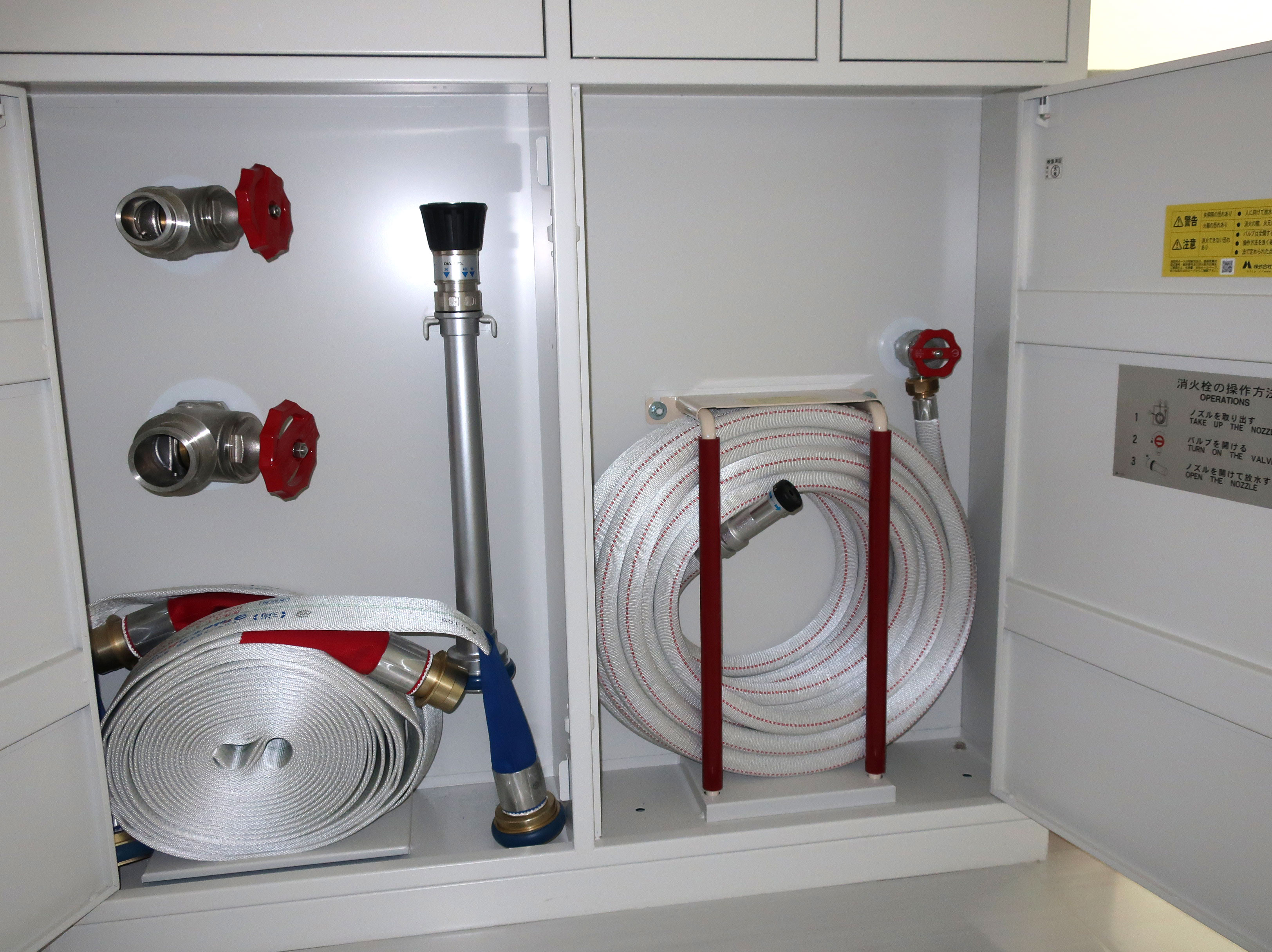 日本の補助散水栓（右）と消防隊用送水口（左）